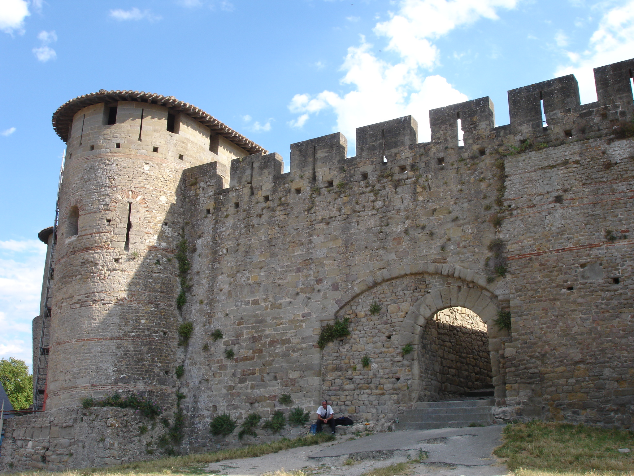 France, Aude (11), Carcassonne, porte du bourg ou de Rodez